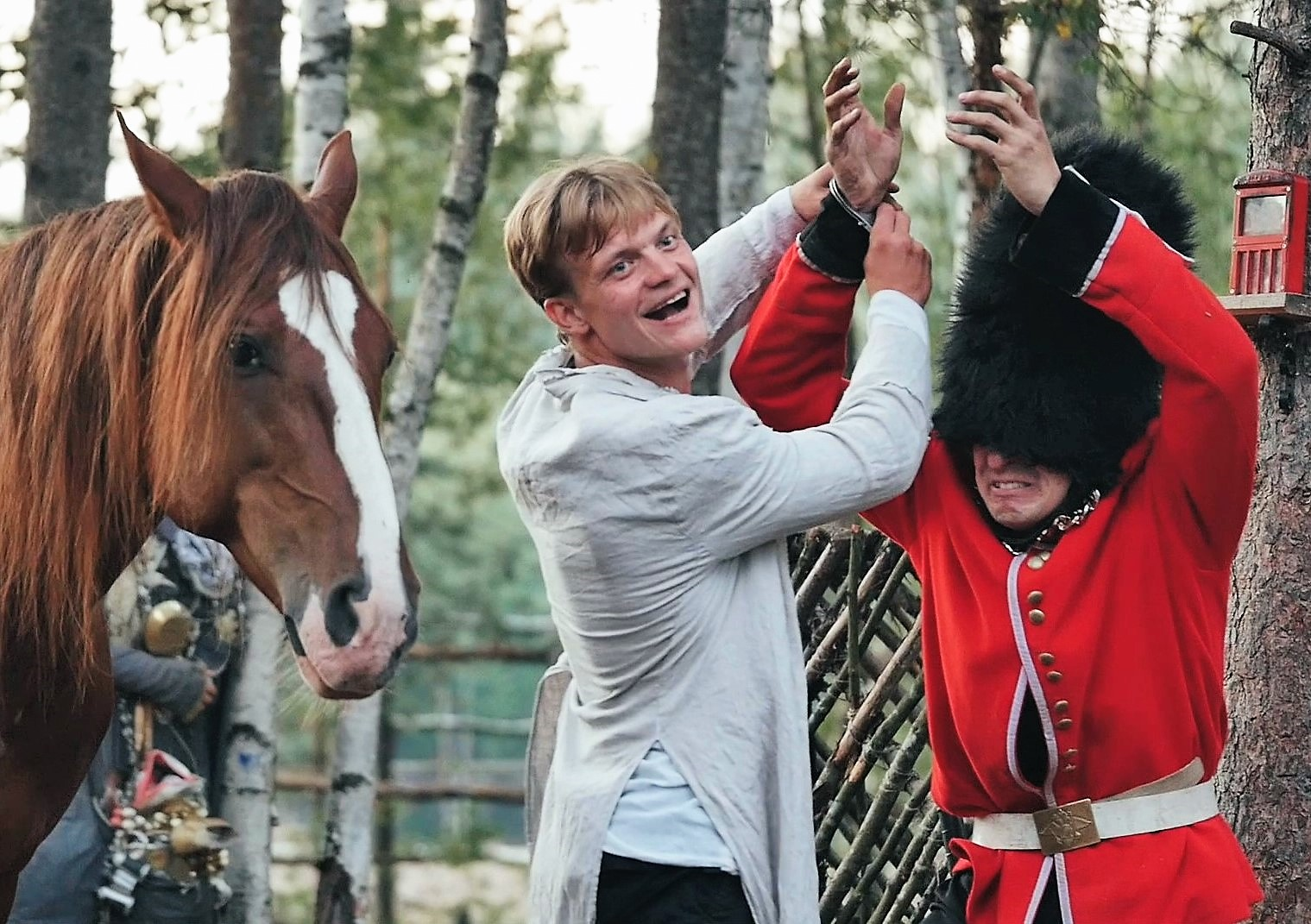 Сцена из спектакля "Danger, Gulliver!", Конно-драматический театр "ВелесО", август 2018